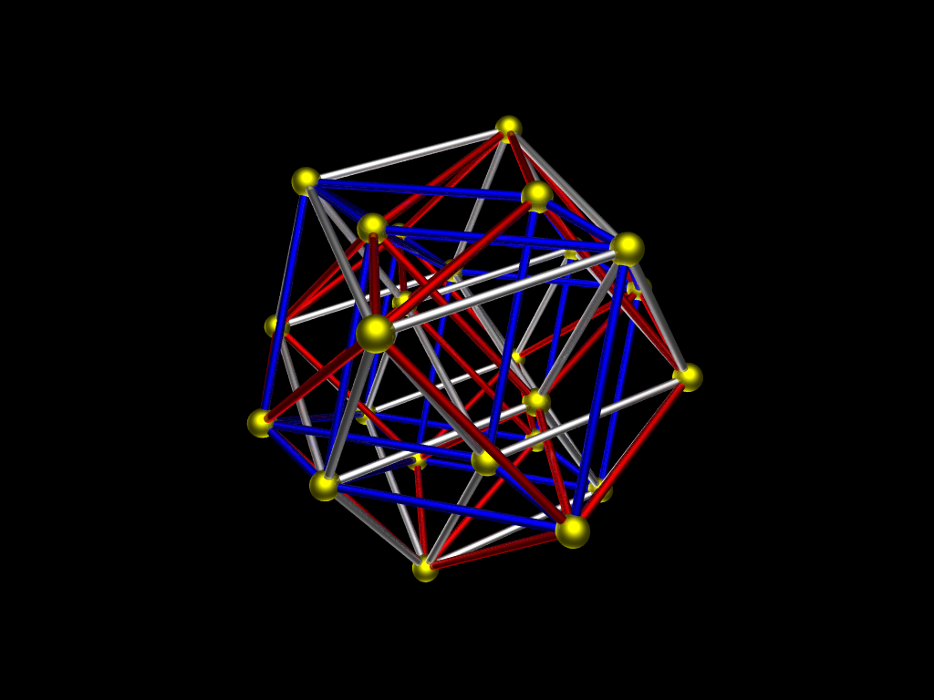 Partition des arêtes d'un 24-cell en trois hypercubes.